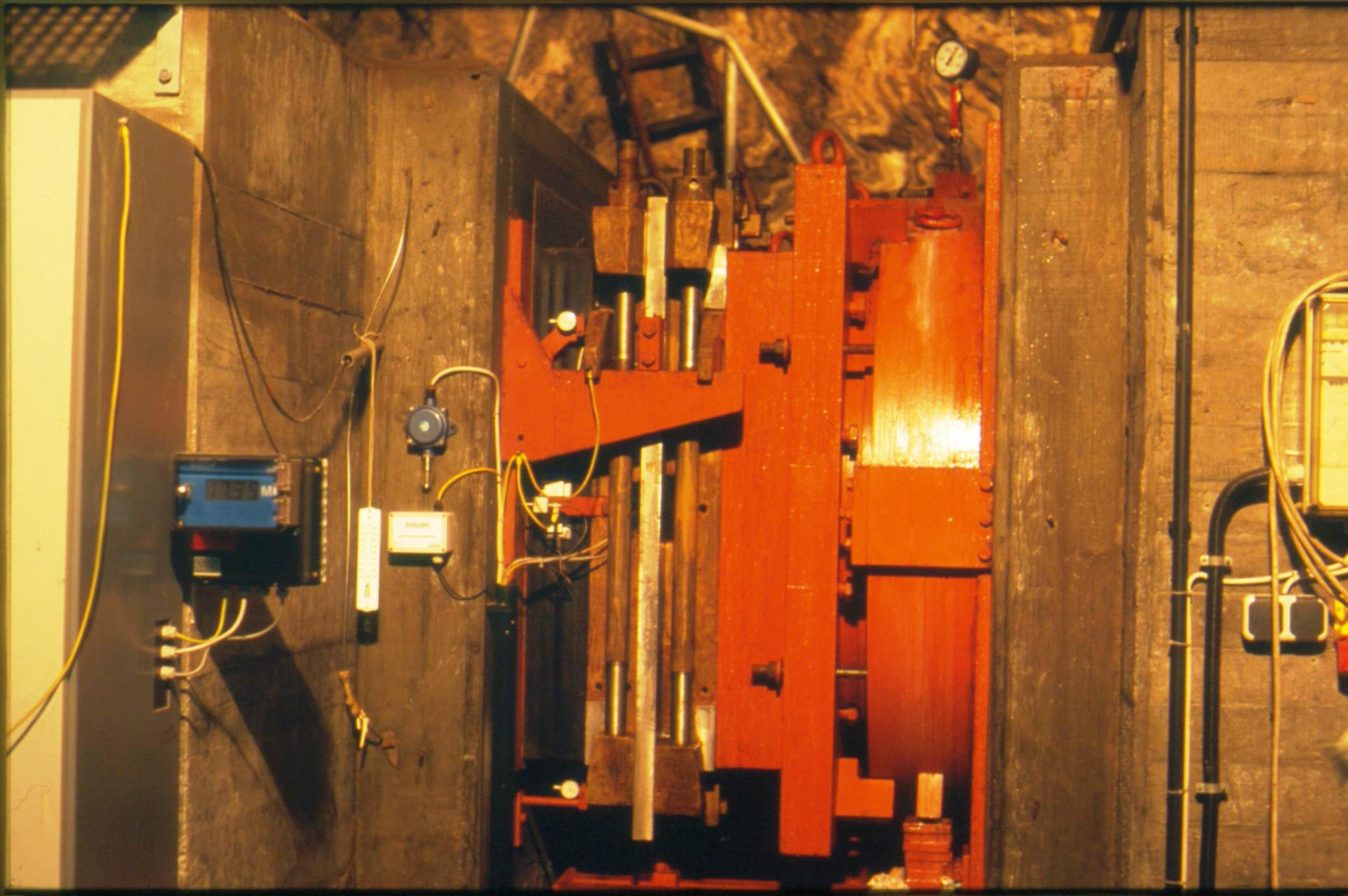 Stützelement zwischen der eigentlichen Talsperre und dem talseitig vorgebautem Stützgewölbe